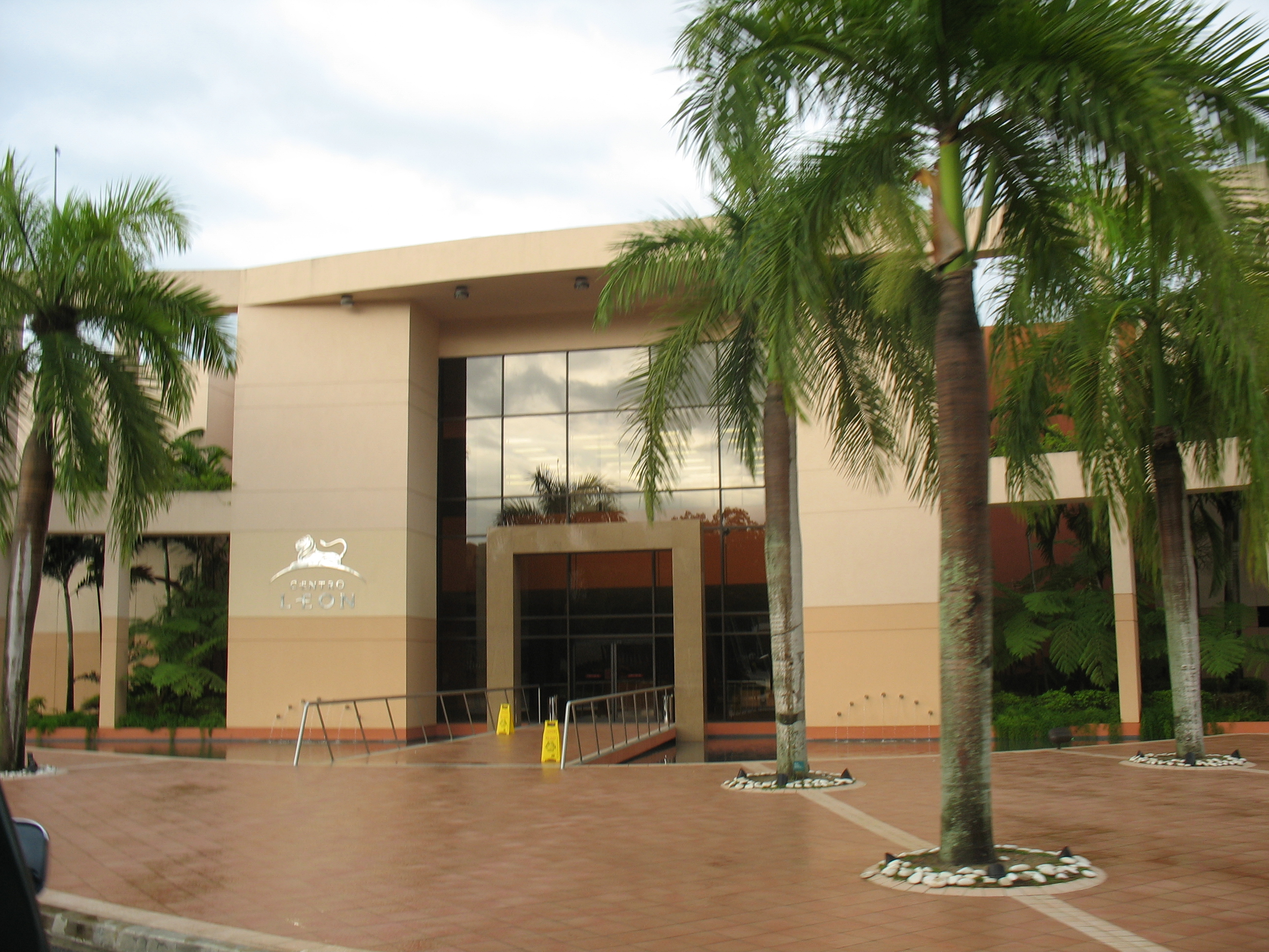 Centro Cultural Eduardo León Jiménes